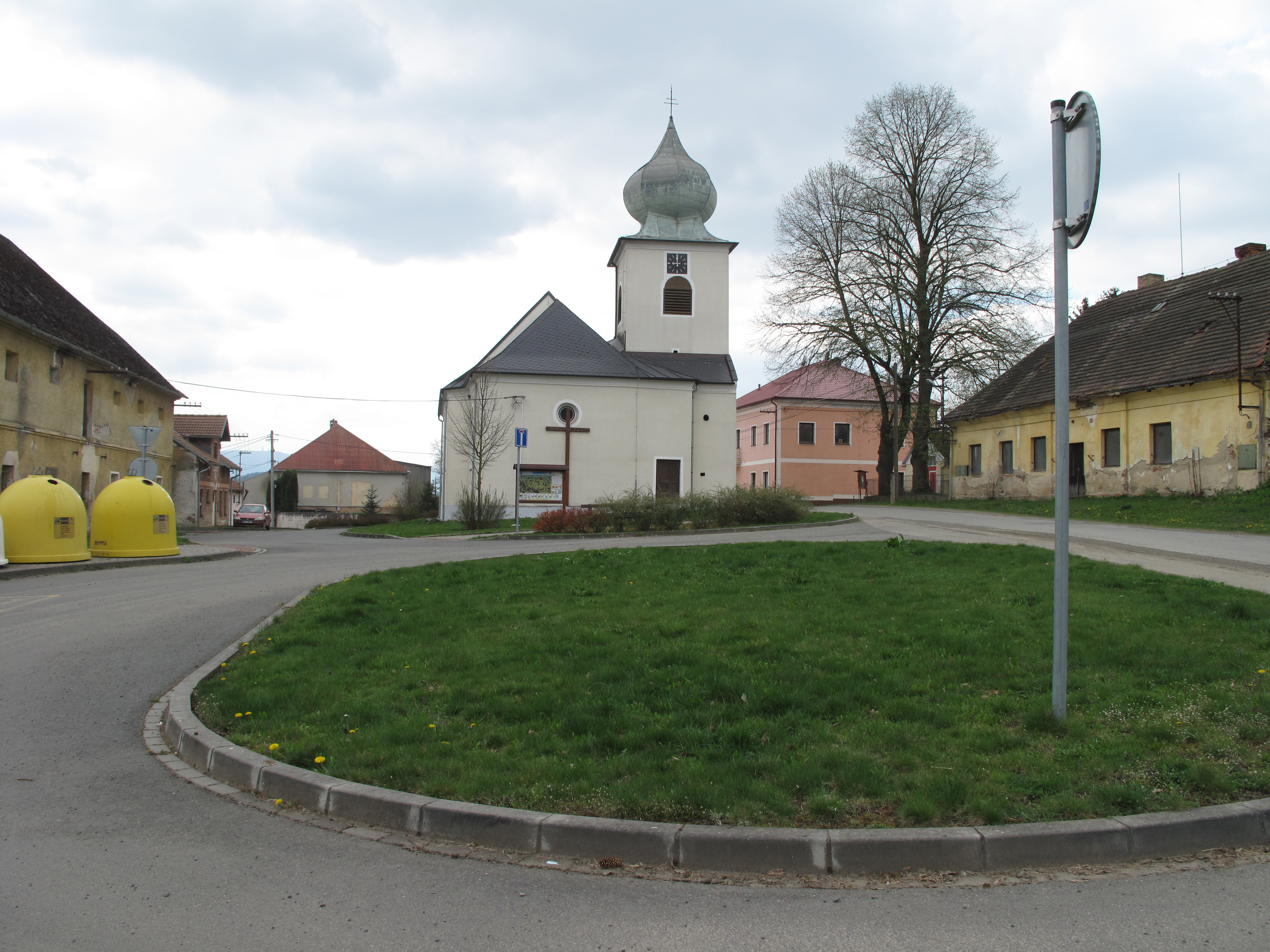 Hyršov. Okres Domažlice, Česká republika.